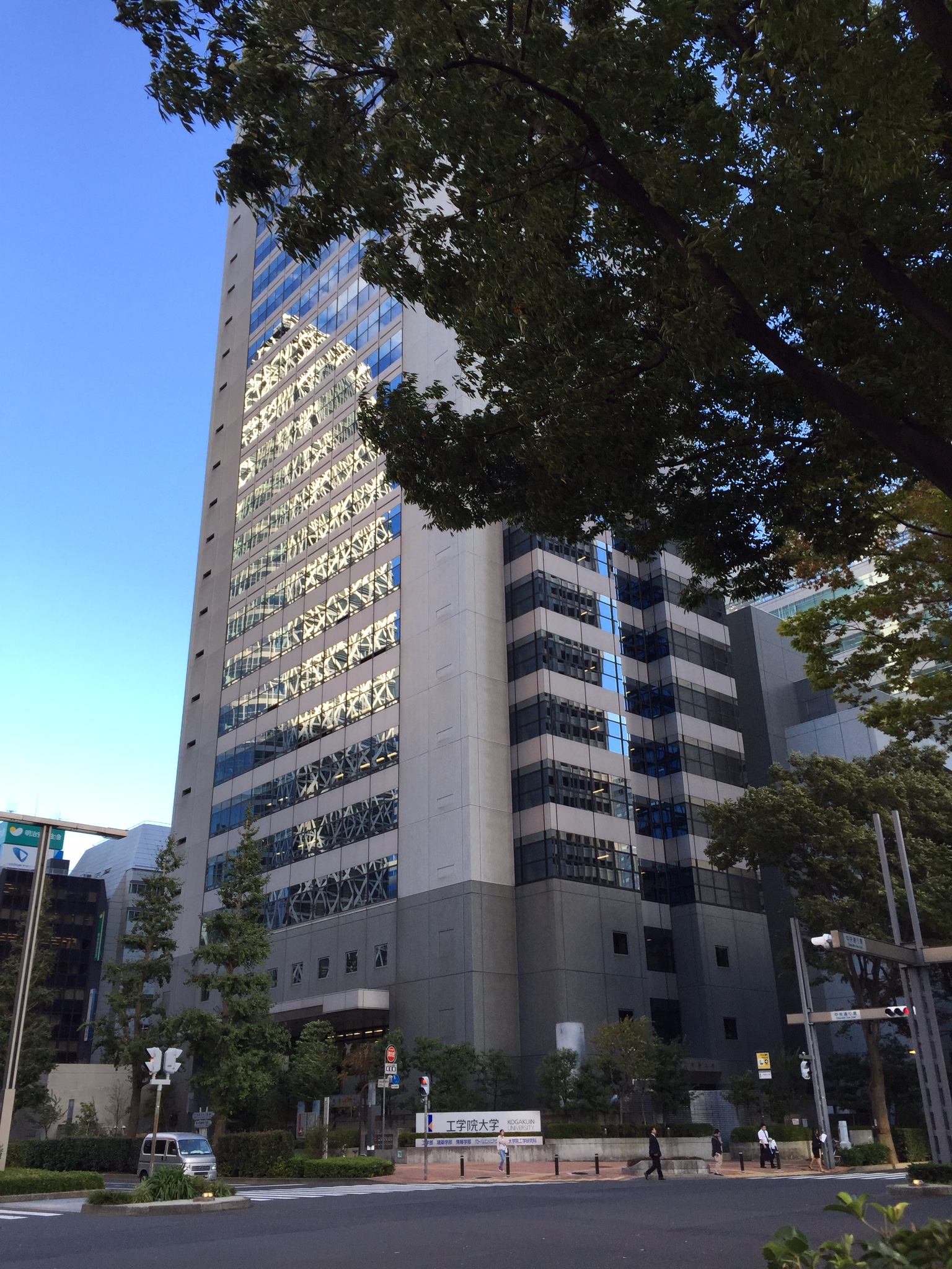 Jawa: 工学院大学新宿キャンパス